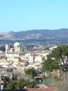 Photo personnelle